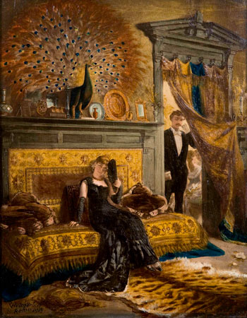 "O importuno", do pintor brasileiro Pedro Weingärtner.